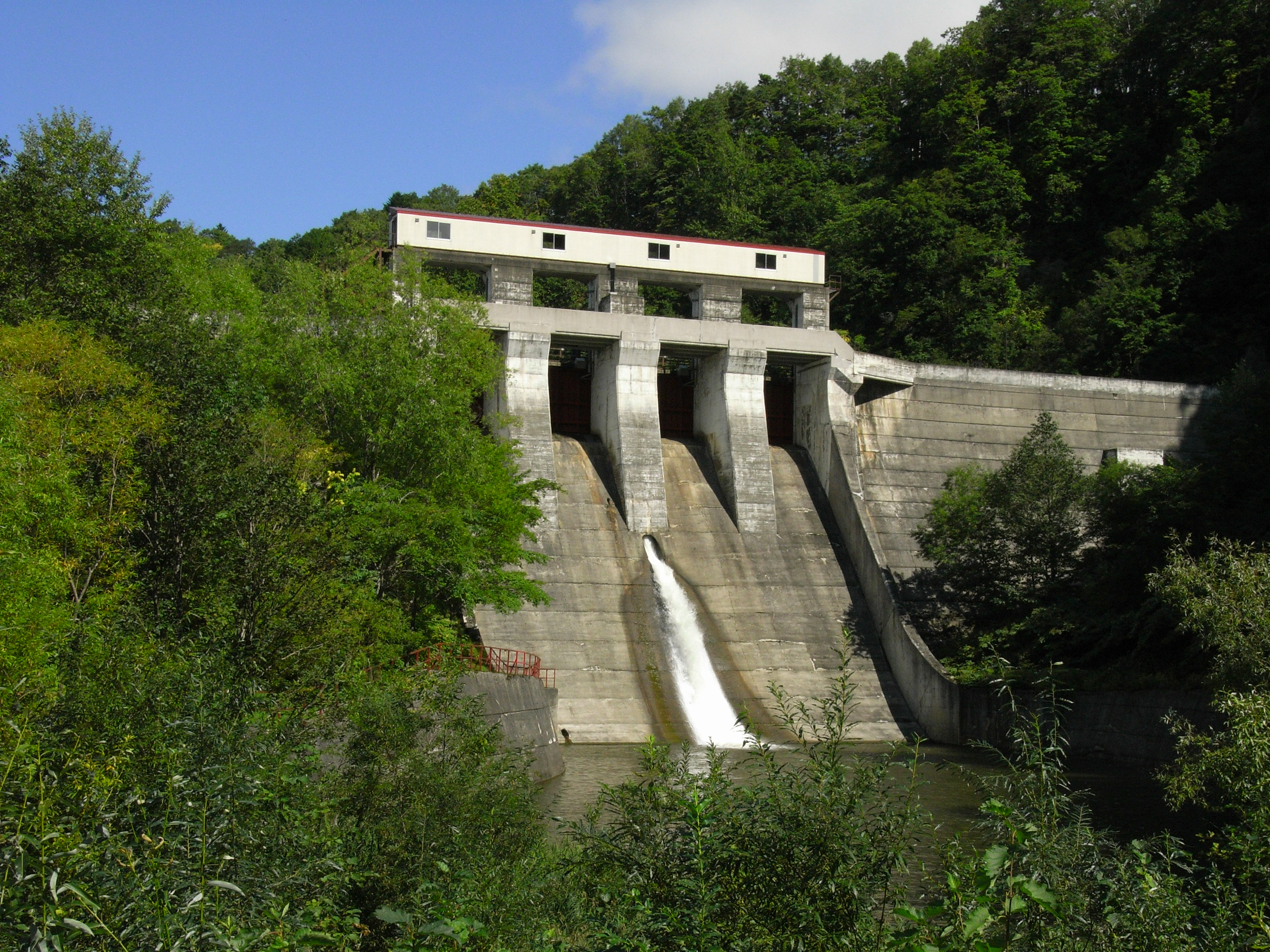 Dam